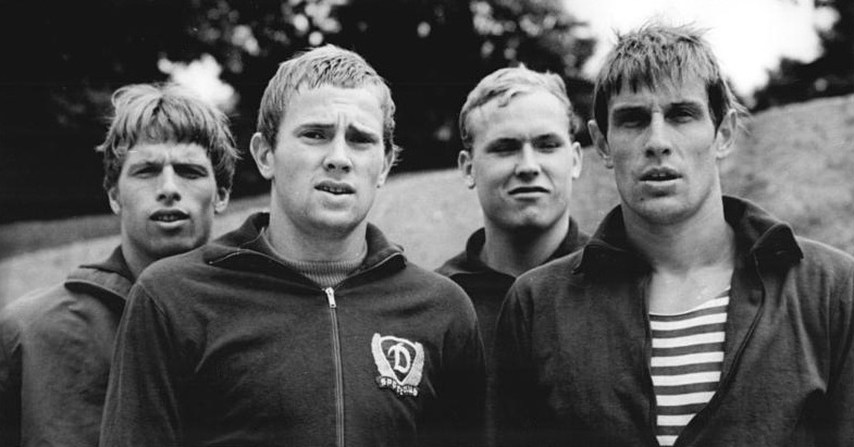 Bernd Rudel, Lutz Unger, K.-Rüdiger Mann, Peter Rund Zentralbild Liebers 11-7-70-Brandenburg: XXI. DDR-Meisterschaften im Sportschwimmen-Die siegreiche 4 x 200-m-Freistilstaffel des SC Dynamo Berlin erzielte mit 8:11,3 min einen neuen DDR-Rekord für Klubstaffeln. V.l.: Bernd Rudel, Lutz Unger, K.-Rüdiger Mann und Peter Rund.